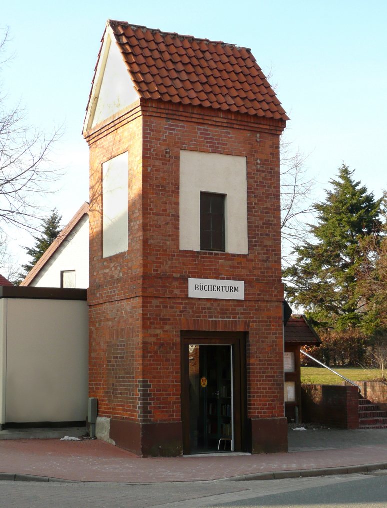 Bücherturm in Holtensen bei Weetzen